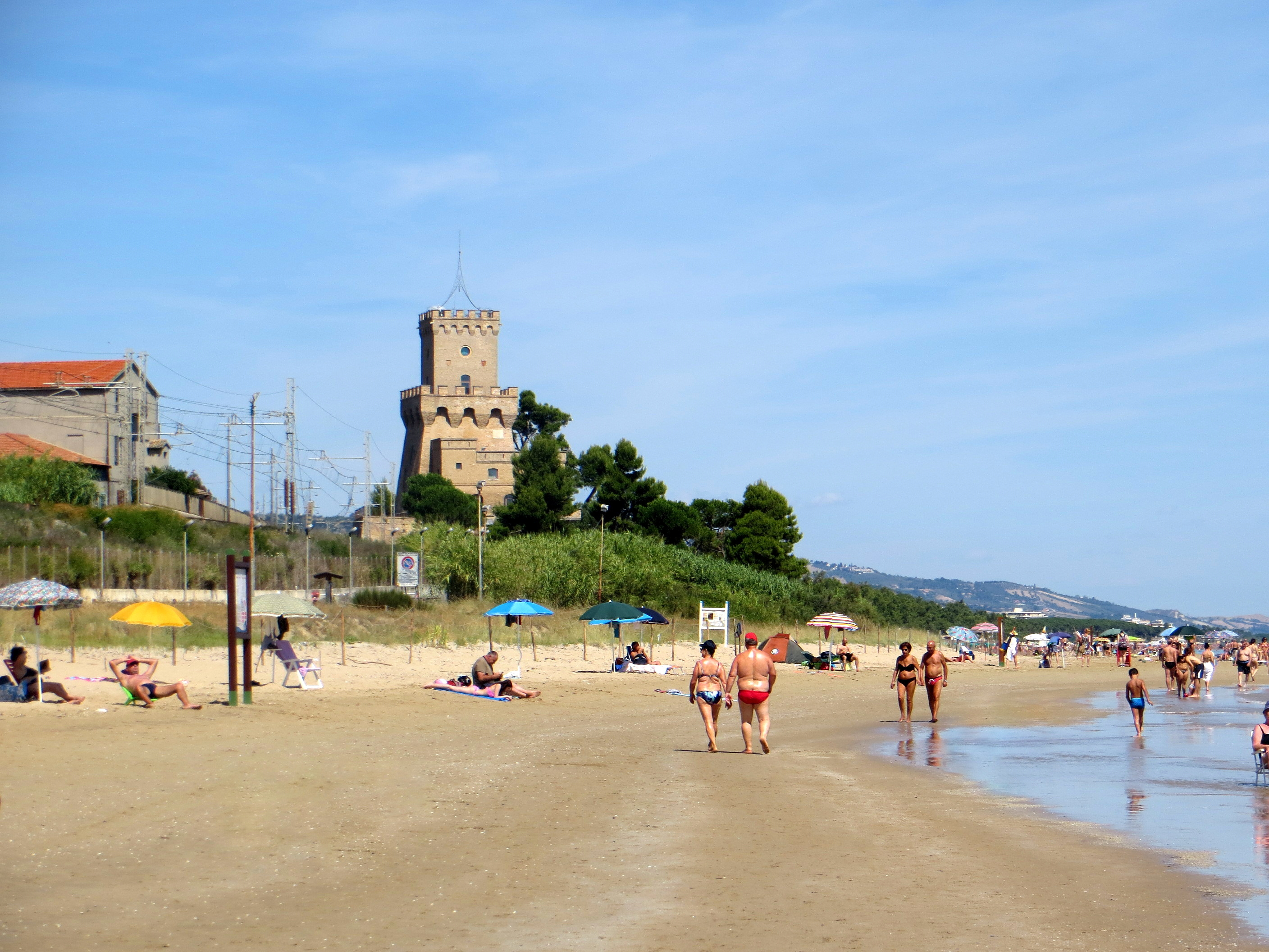 Tratto di spiaggia tra Silvi Marina e Pineto con la Torre di Cerrano